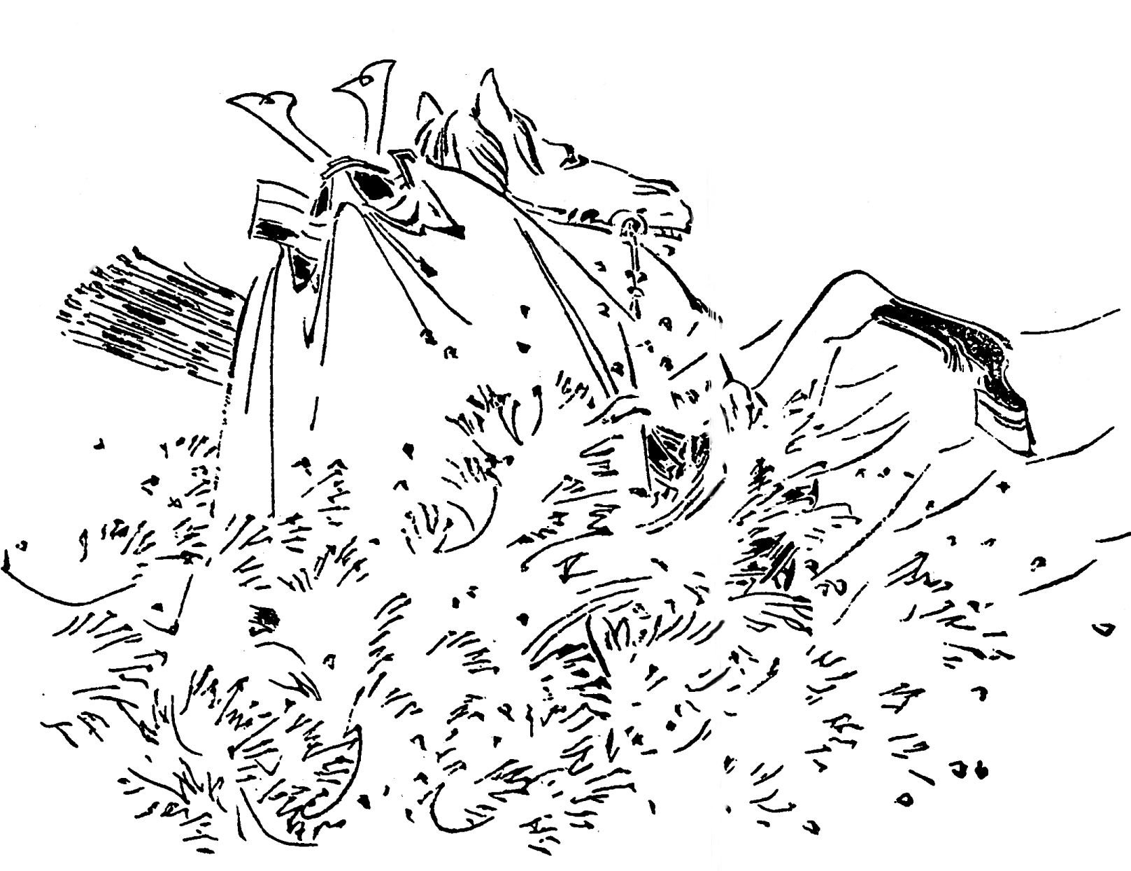 足利忠綱。平安時代の末期武将。／江戸時代『前賢故実』より。画：菊池容斎